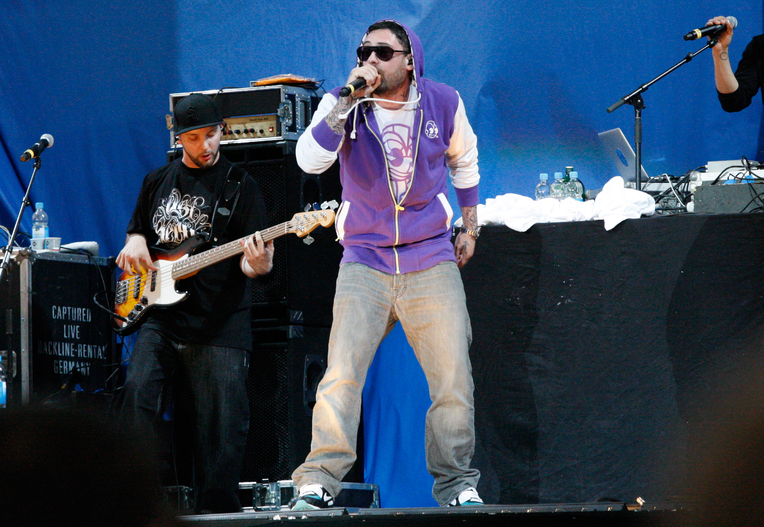 Der deutsche Rapper Sido steht am 04. Juni 2011 im Rahmen von Mario Barths Stadiontour in der Frankfurter Commerzbank-Arena auf der Bühne.